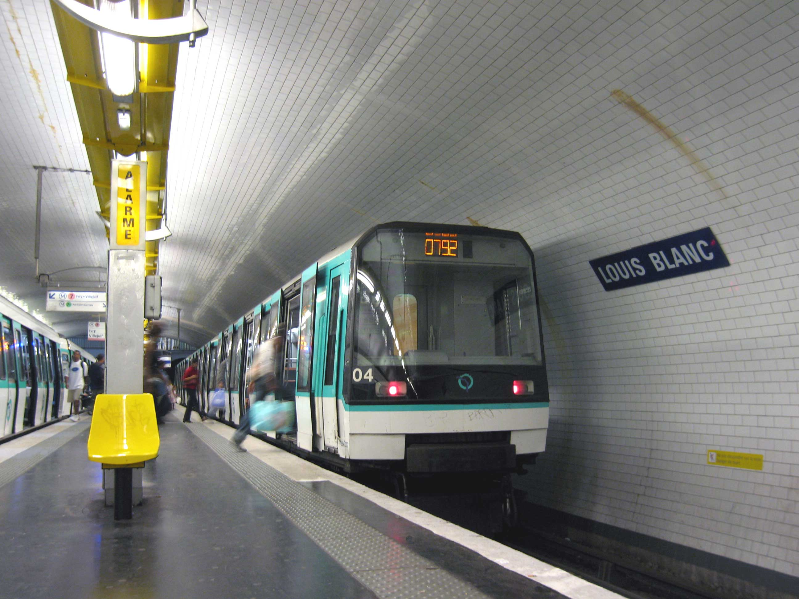 Description : Station Louis Blanc, Rame MF88 en stationnement, à gauche rame MF77 Place : Paris, France Date : Juillet 2006 Auteur : Pline photo personnelle